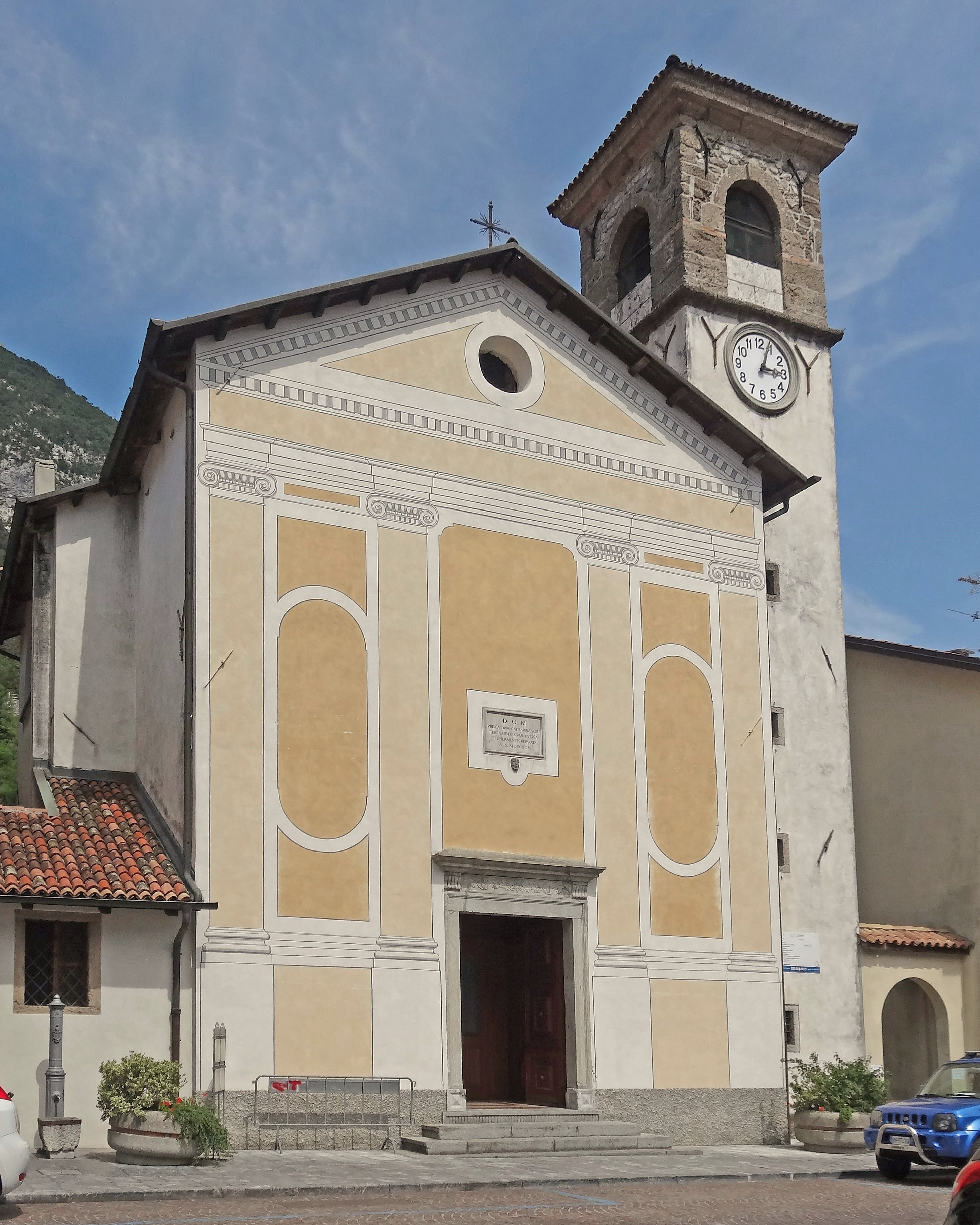 Die Kirche Hl. Katharina in Tolmezzo